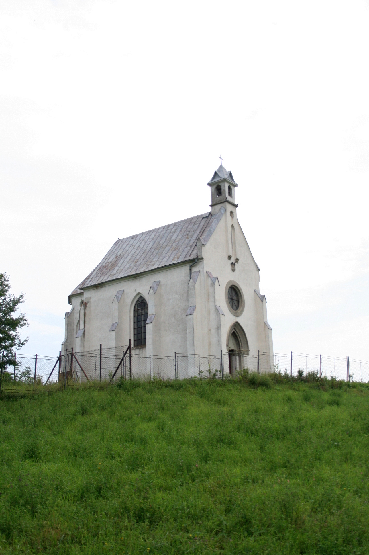 Capela familiei Nemes de la Haghig